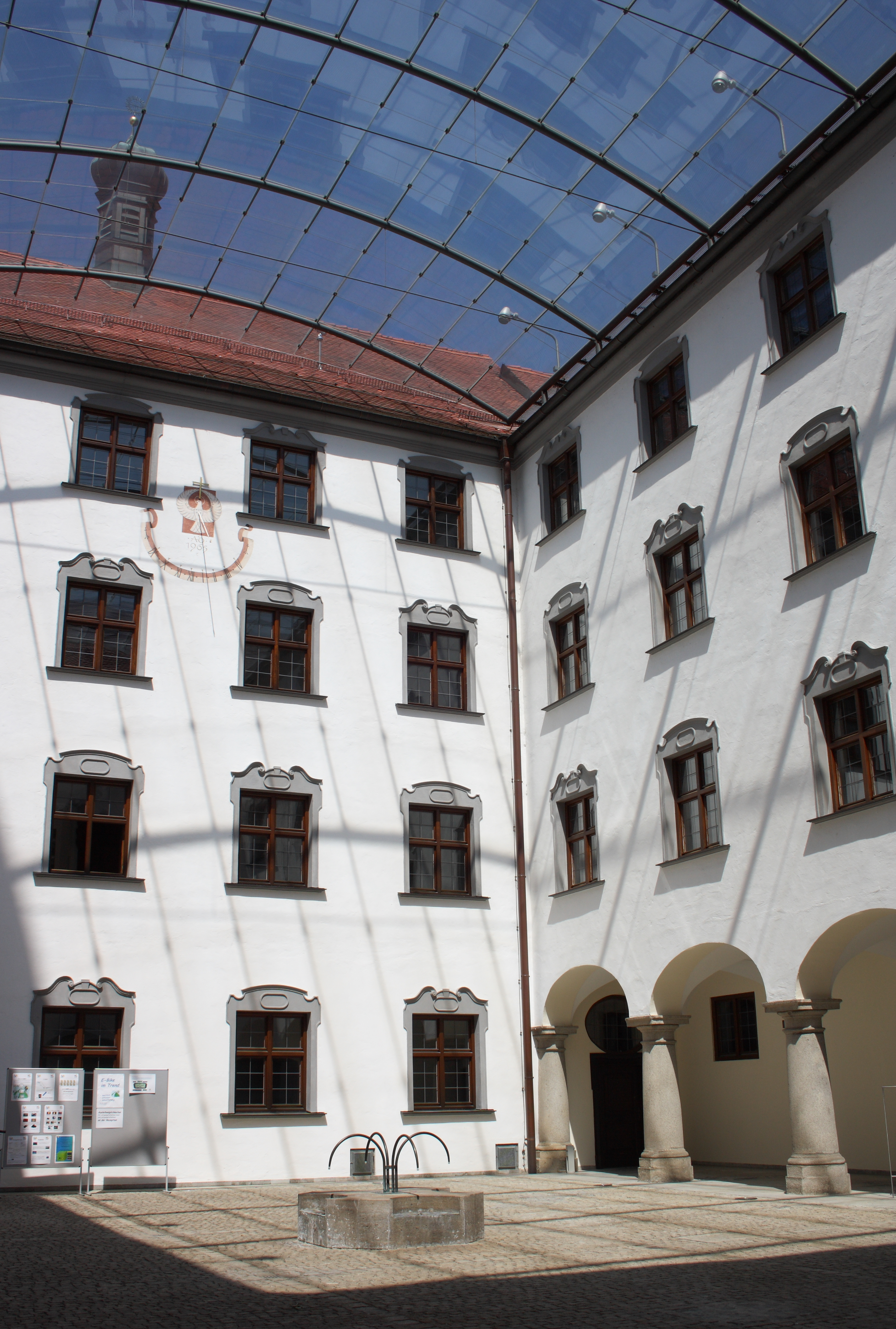 Gebäude der Akademie für Lehrerfortbildung und Personalführung in Bayern in Dillingen an der Donau (Bayern), Innenhof des ehemaligen Jesuitenkollegs